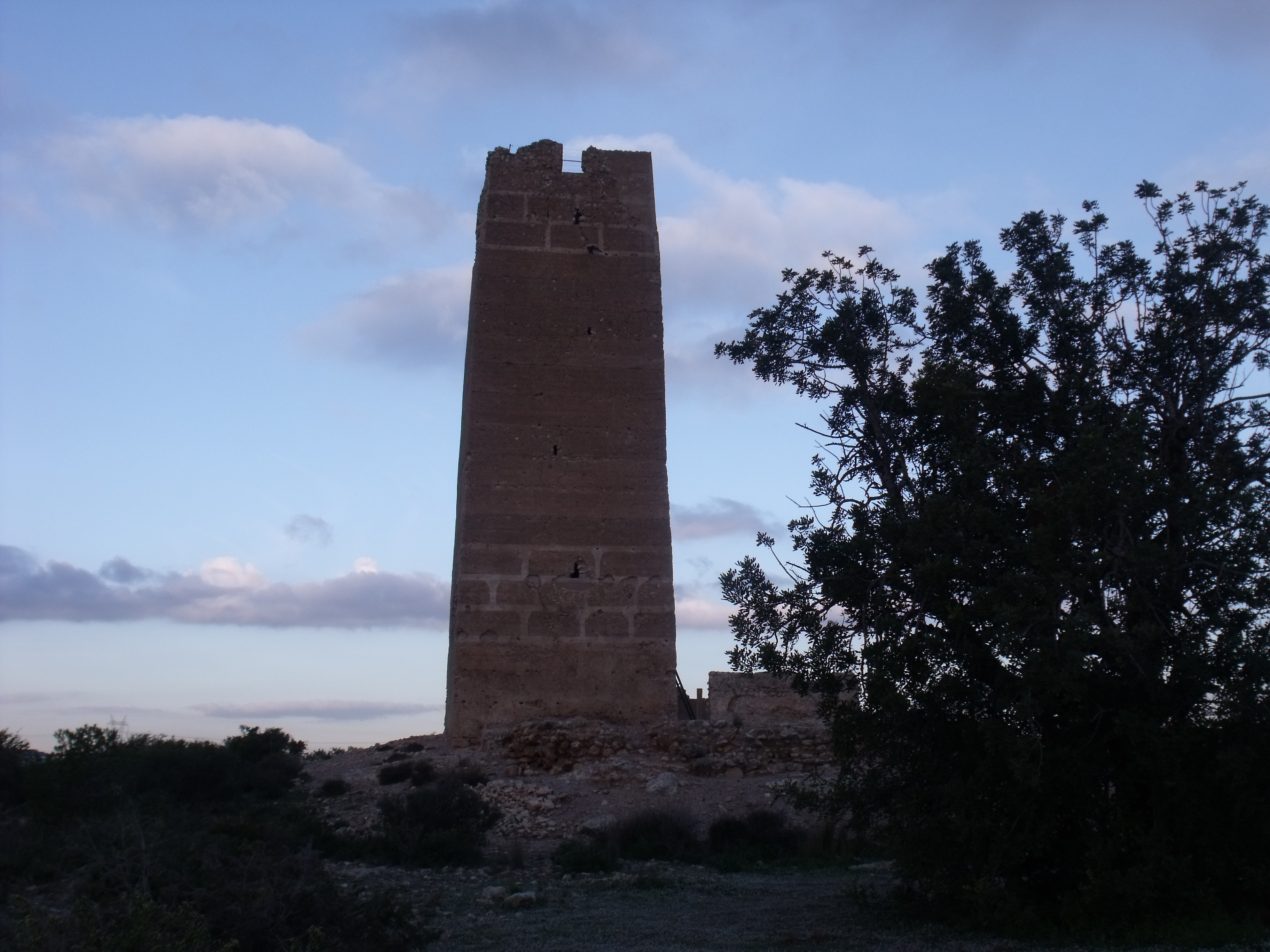 Torre Bofilla, Bétera, España.